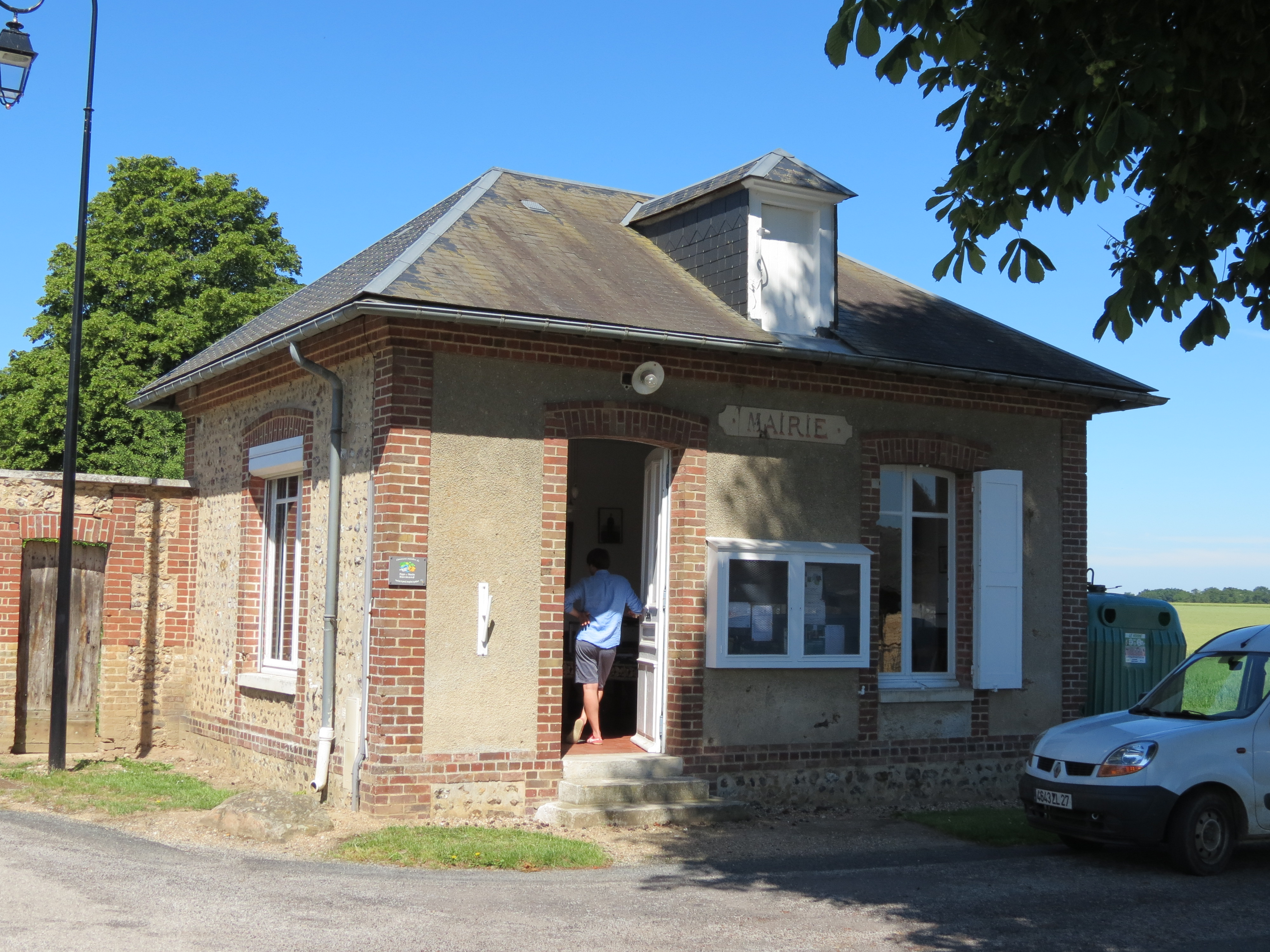 Mairie de Thuit